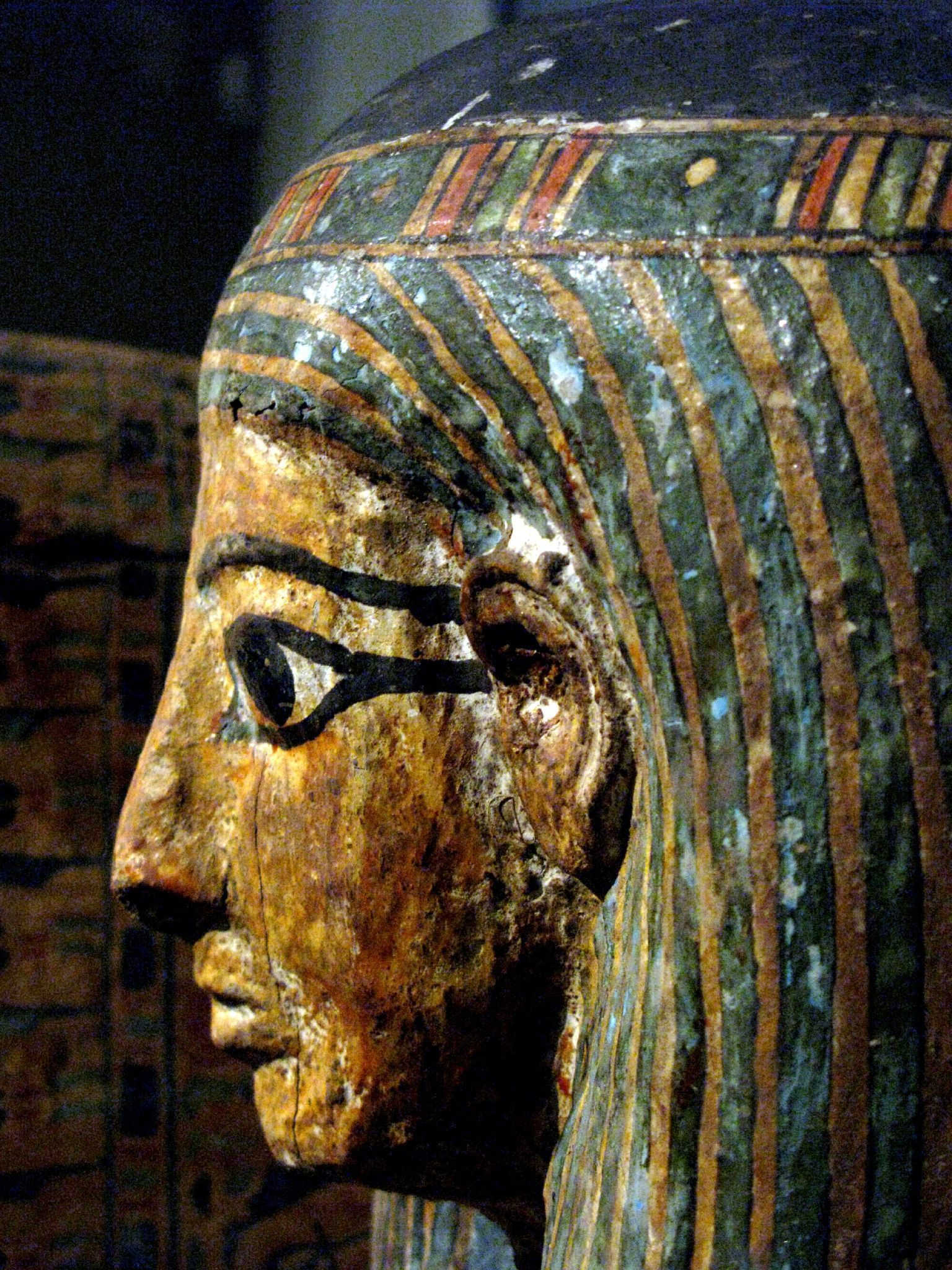 Kist uit de 21e dynastie (1075-945 v. Chr.), inv. APM 16.500 kist uit de 21ste dynastie , Egypte, ca.1000 v Chr. sarcophagus, Egypt, around 1000 BC